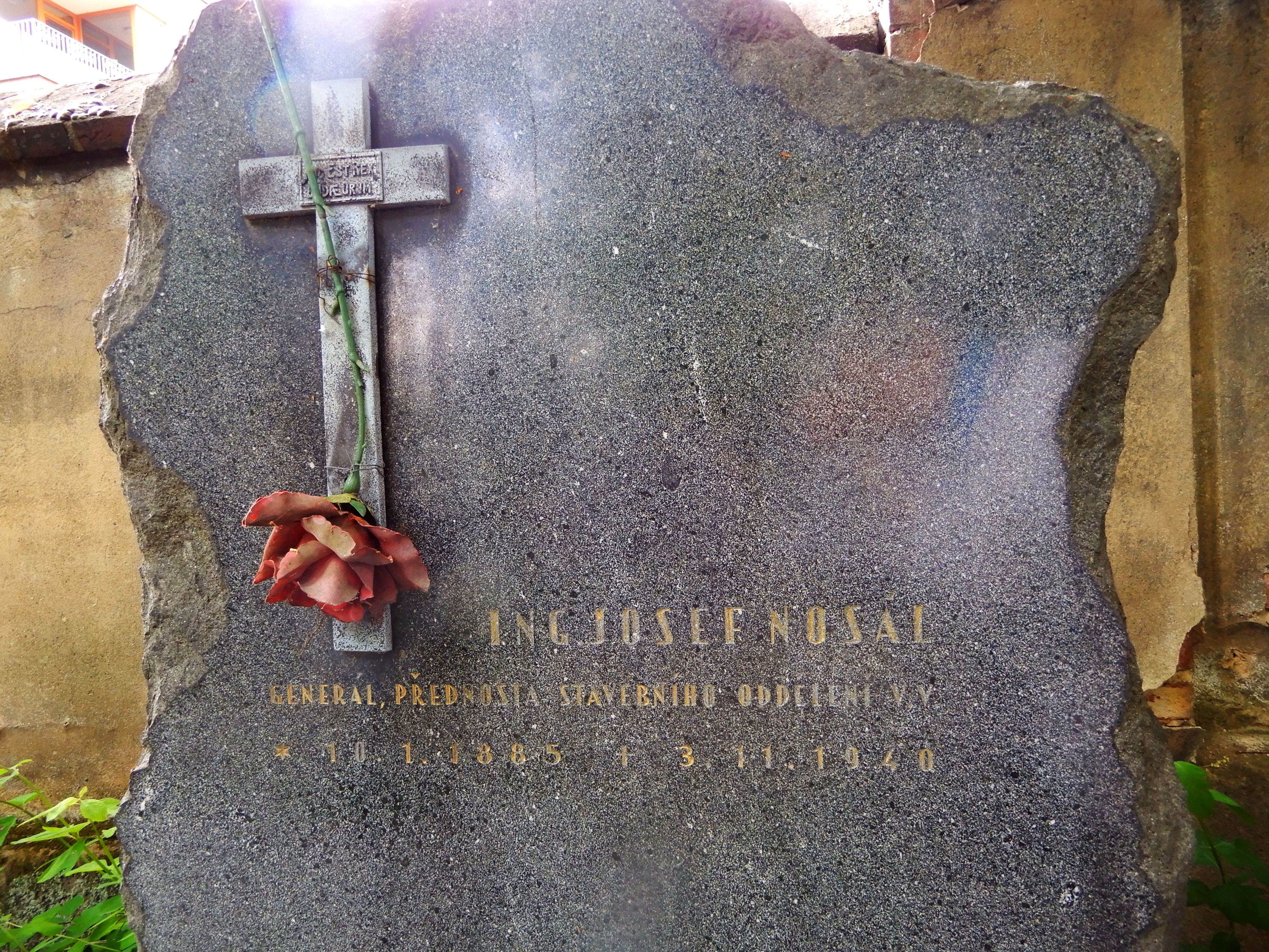 Ing. Josef Nosál generál a ruský legionář (1885-1940), hrob na Střešovickém hřbitově